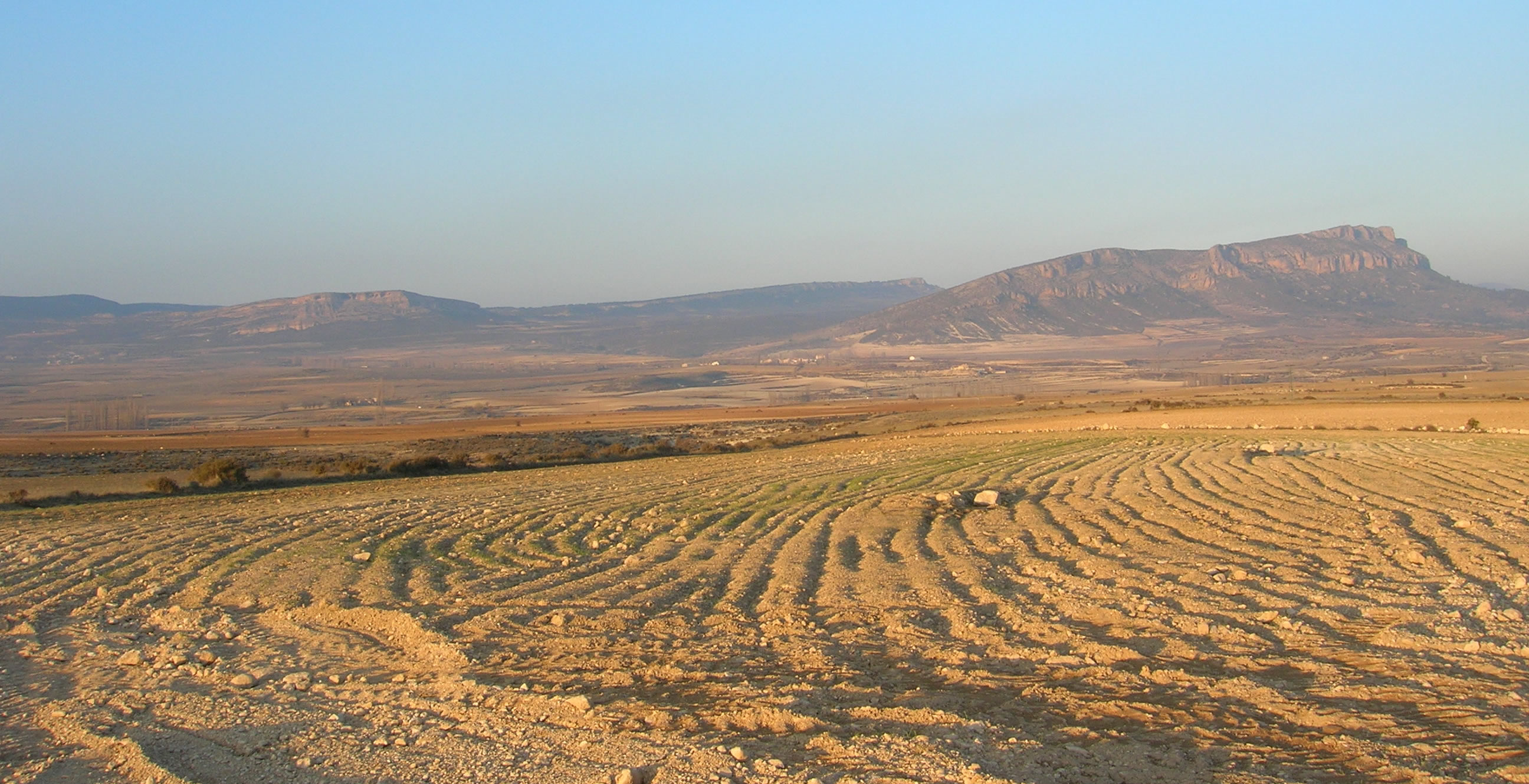 Campo de San Juan, visto desde Casicas de San Juan. A la izquierda y al fondo, Bajil; a la derecha y en segundo término, el Lanchar Campo de san Juan (Moratalla, Murcia, España), visto desde San Juan. Al fondo y a la izquierda, las cuevas de Bajil. En segundo término y a la derecha, El Lanchar, mirando hacia el valle del Alhárabe, poco después de que su curso se represe en La Risca. Febrero de 2006.